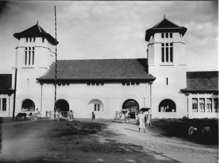 Foto. De ingang van het ziekenhuis de "Centrale Burgerlijke Ziekeninrichting Salemba"